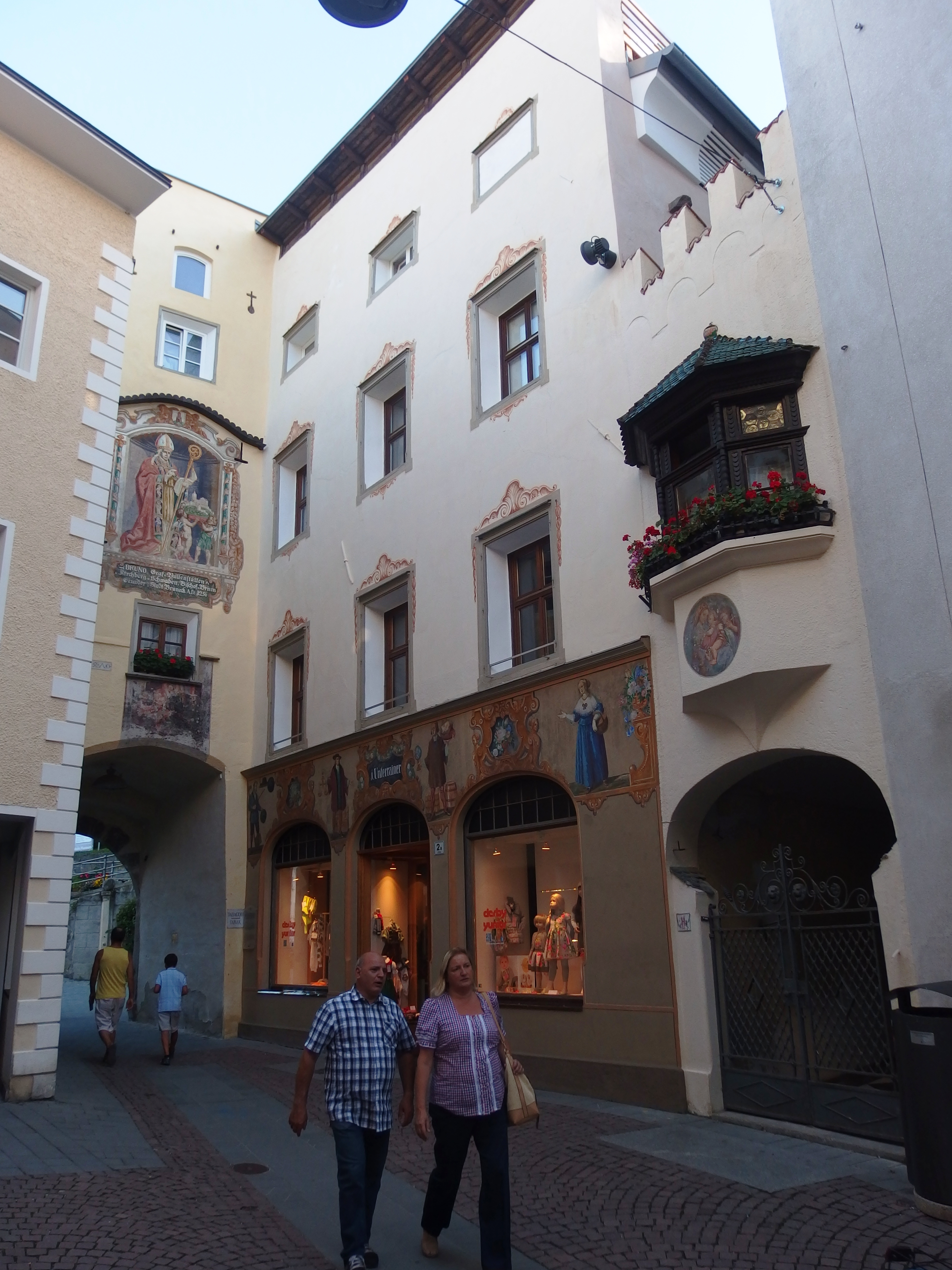 Bruneck, Südtirol: Stadtgasse 2